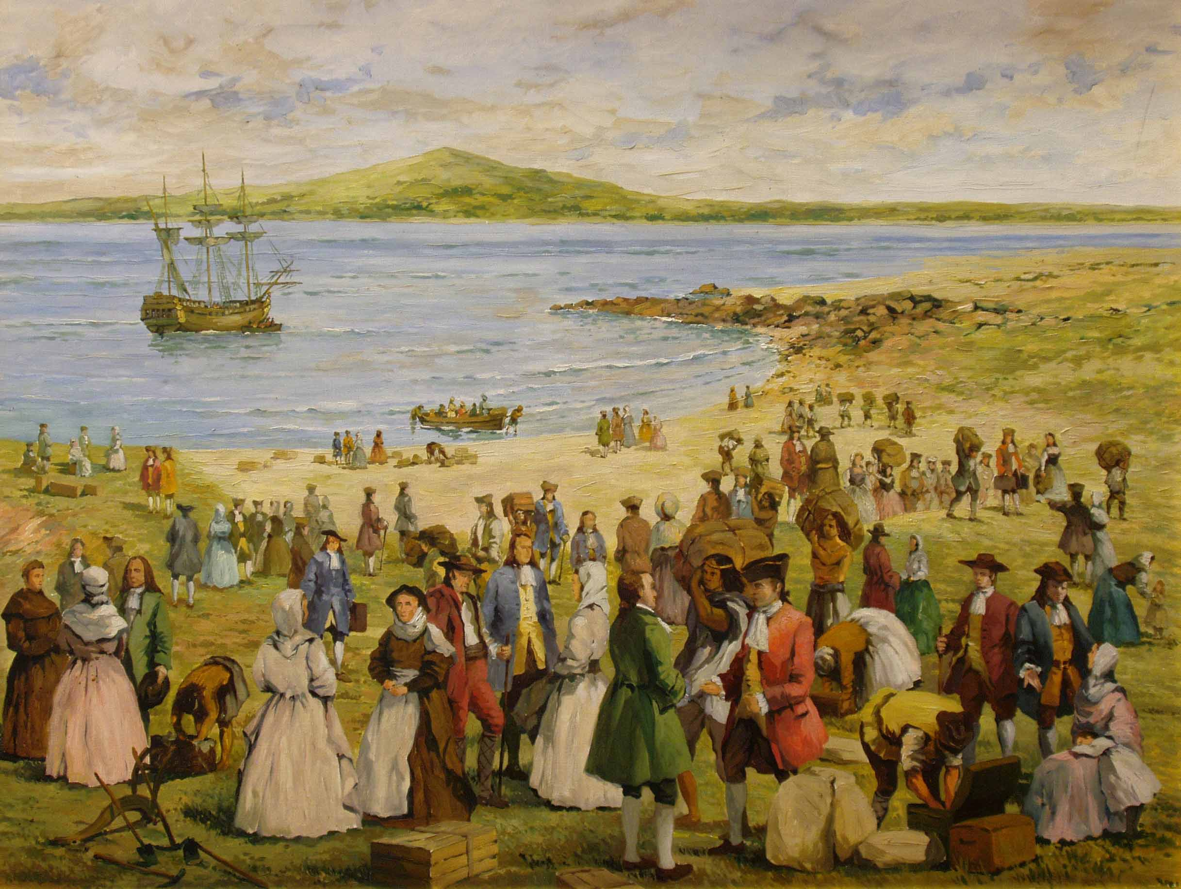 Casa de Colón